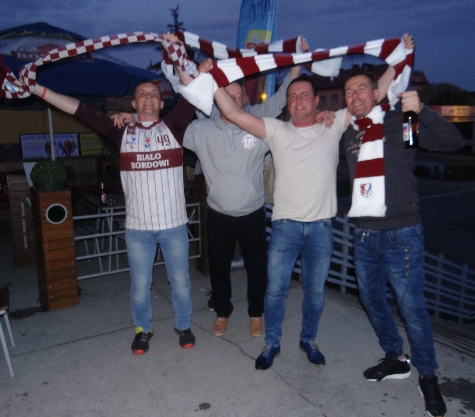 Spójnia Stargard i jej kibice